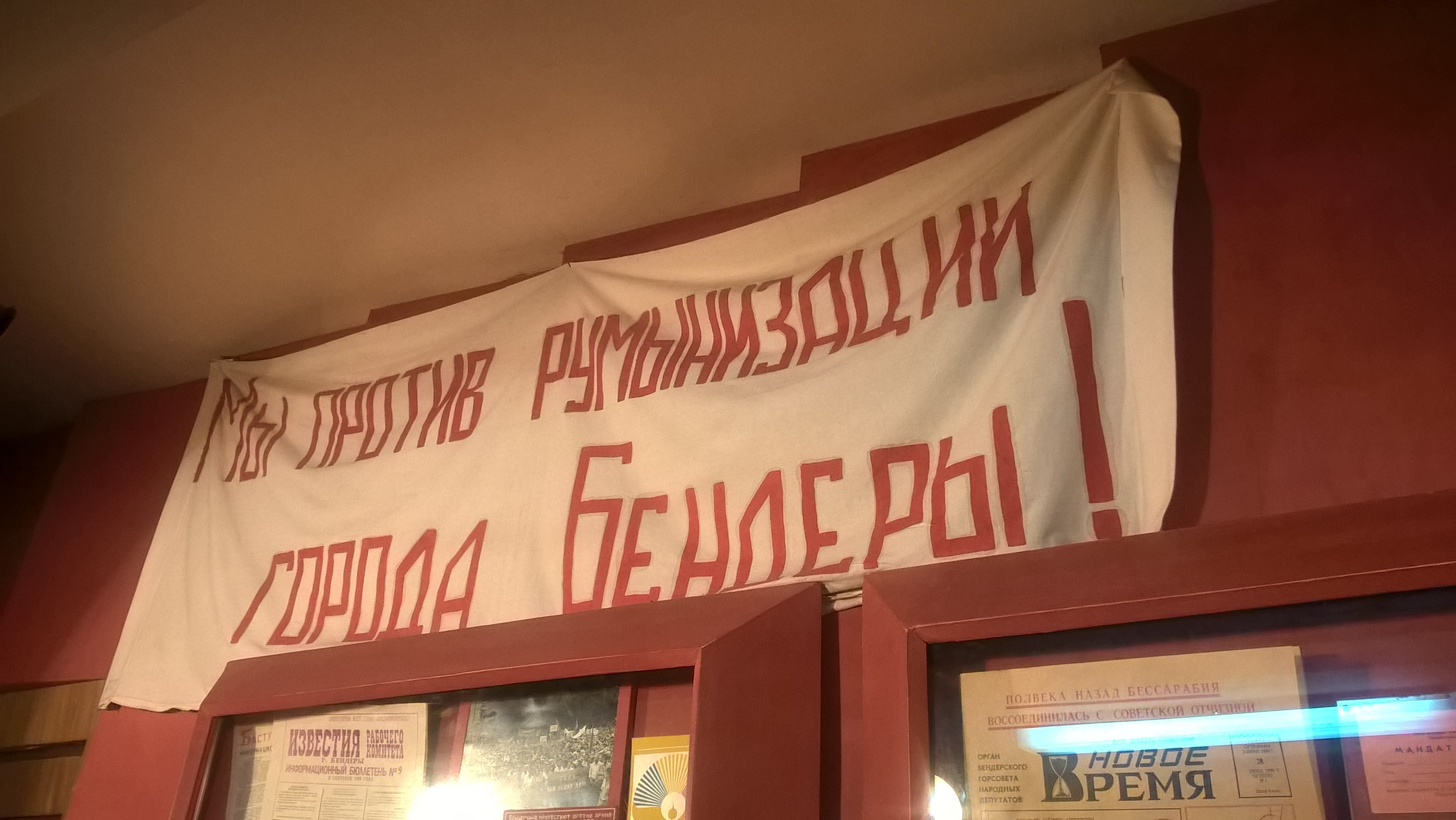 Transparent z hasłem "Jesteśmy przeciwni rumunizacji miasta Bendery!" z okresu demonstracji 1990 r. w Muzeum Benderskiej Tragedii